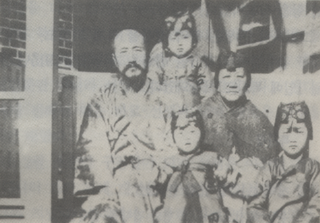 윤치호 출소 직후 어머니 이정무 및 세 딸(은희, 명희, 문희)과 함께